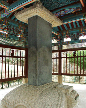 송강 정철 신도비